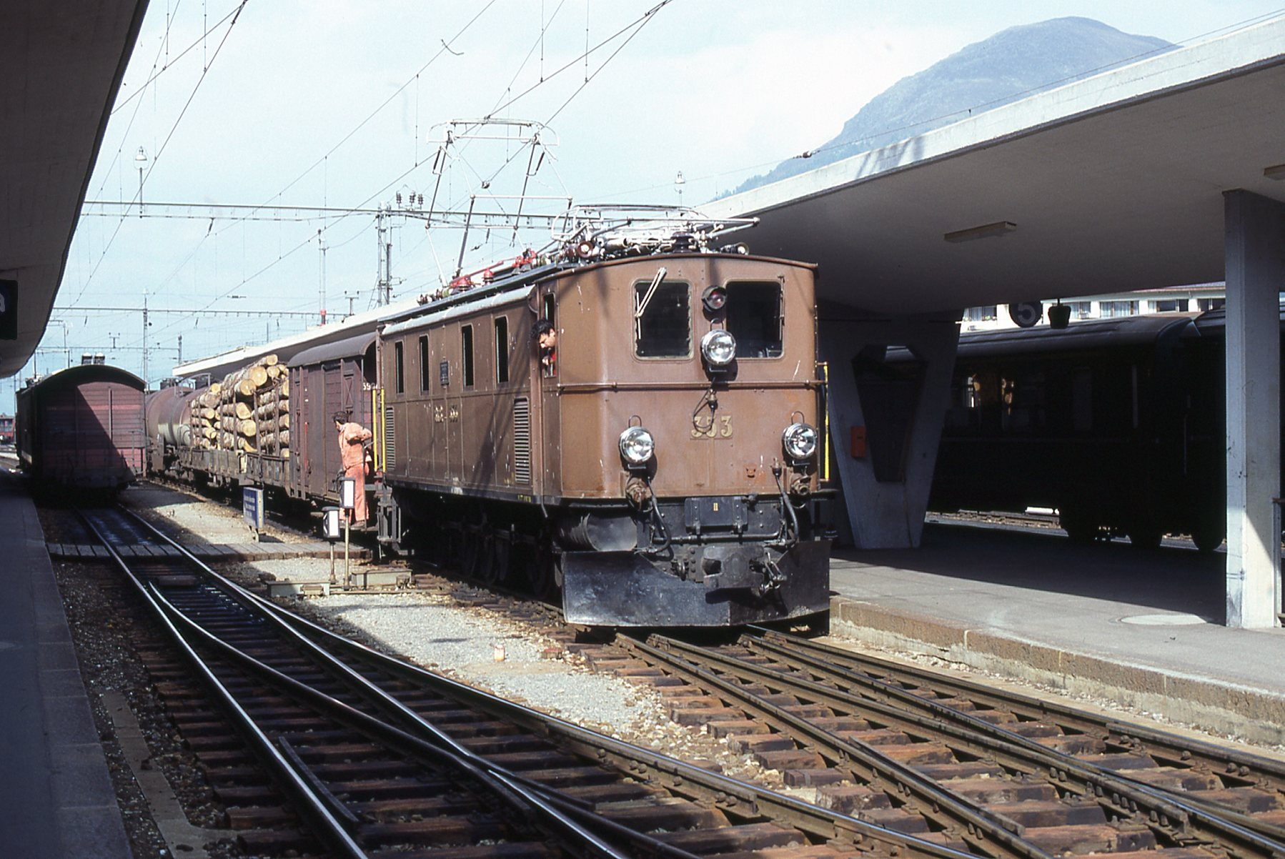 Ge 4/6 353 mit Güterzug im Bahnhof Samedan.